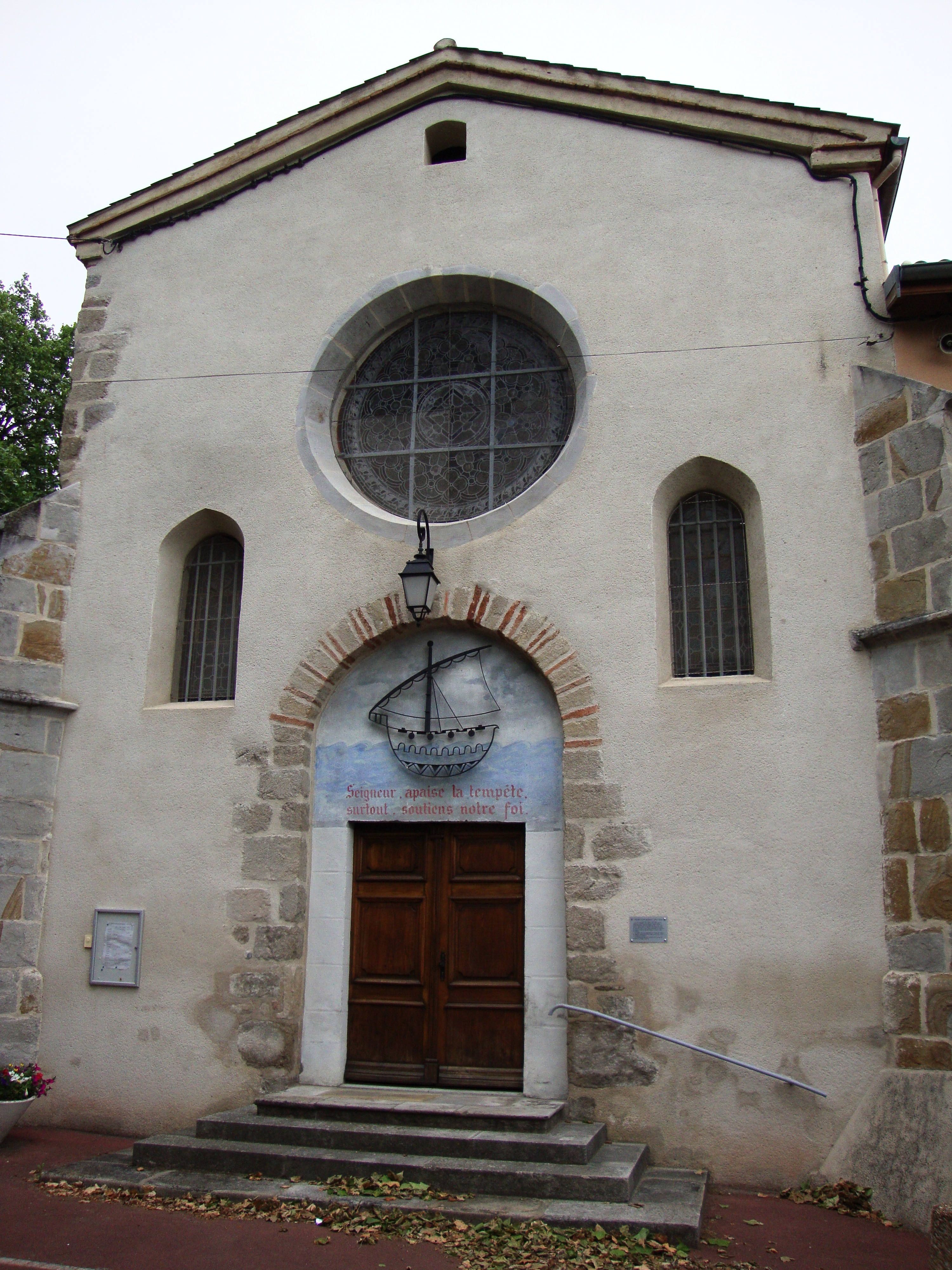 Cuzieu (Loire, Fr) église, façade